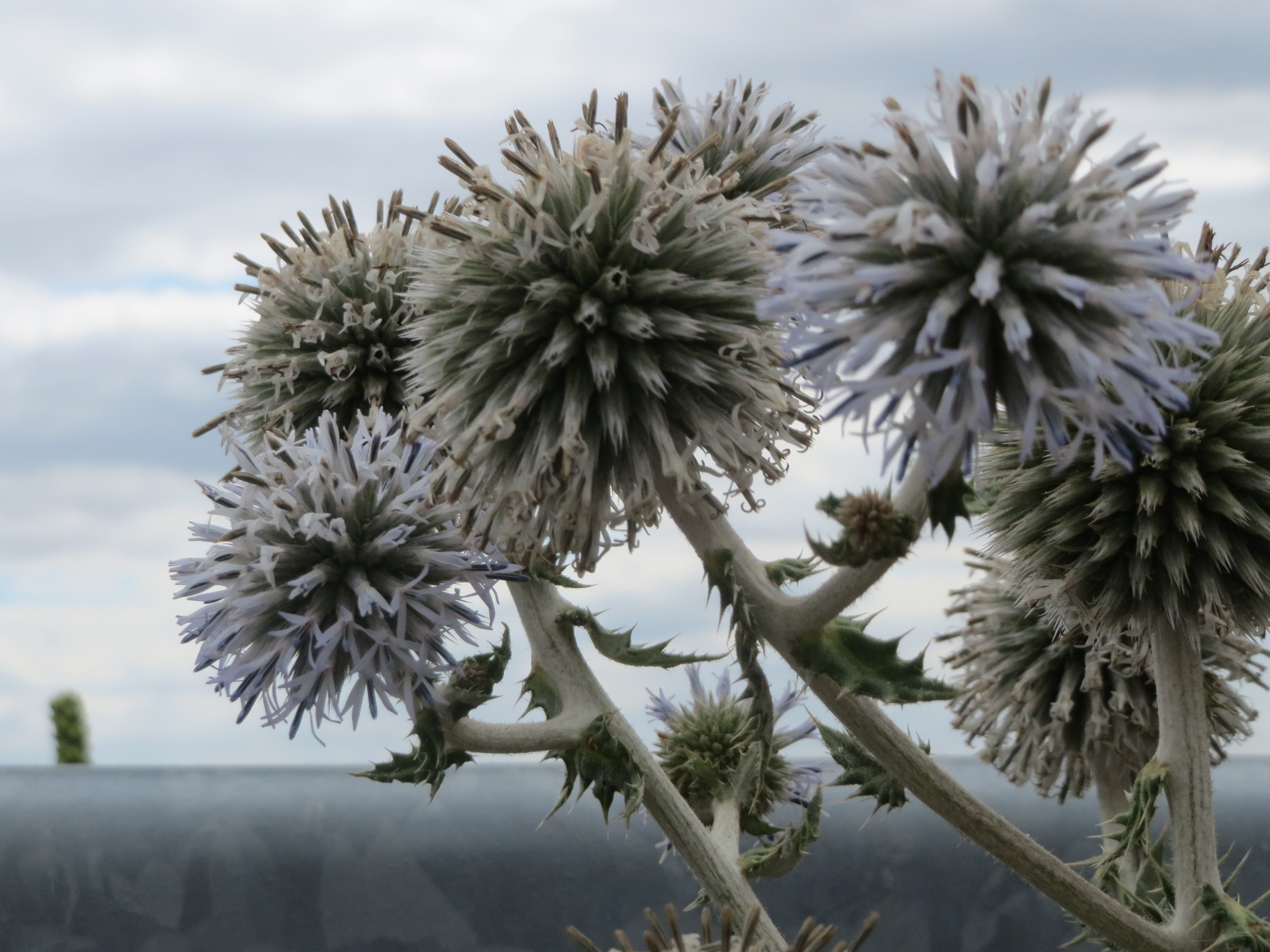 Drüsenblättrige Kugeldistel (Echinops sphaerocephalus) bei Wiesbaden-Nordenstadt